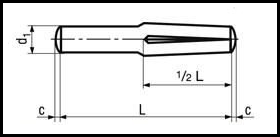 DIN 1474